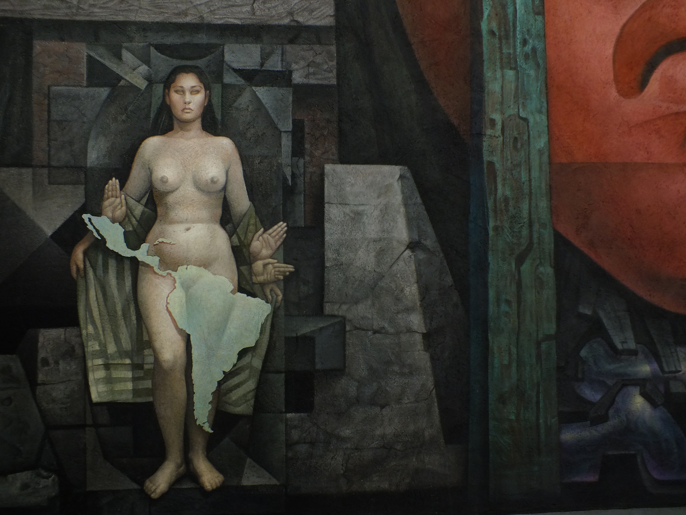 Mural pintado por Jorge González Camarena entre los años 1964 - 1965, se encuentra en la Casa del Arte (Pinacoteca) de la Universidad de Concepción. This is a photo of a national monument in Chile: 2120